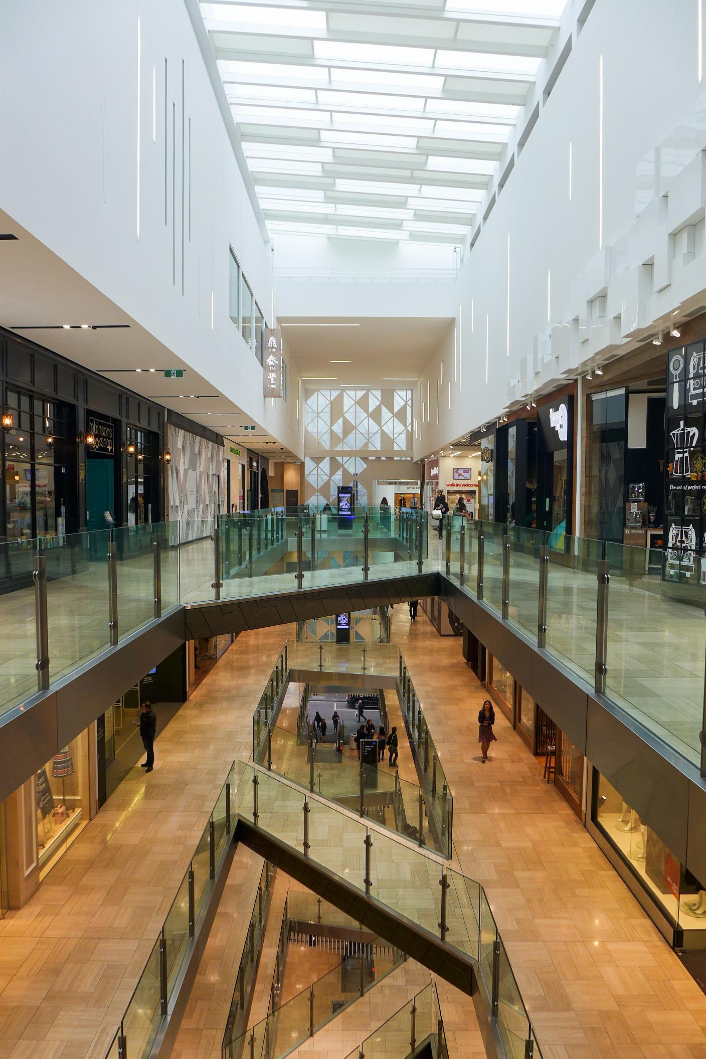 Emporium Melbourne Void